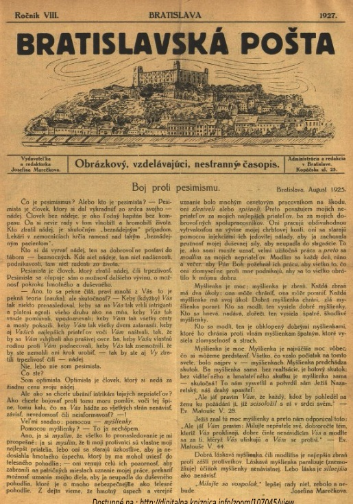 Titulný list periodika, ktoré vychádzalo v Bratislave v 20-ych rokoch 20. storočia.